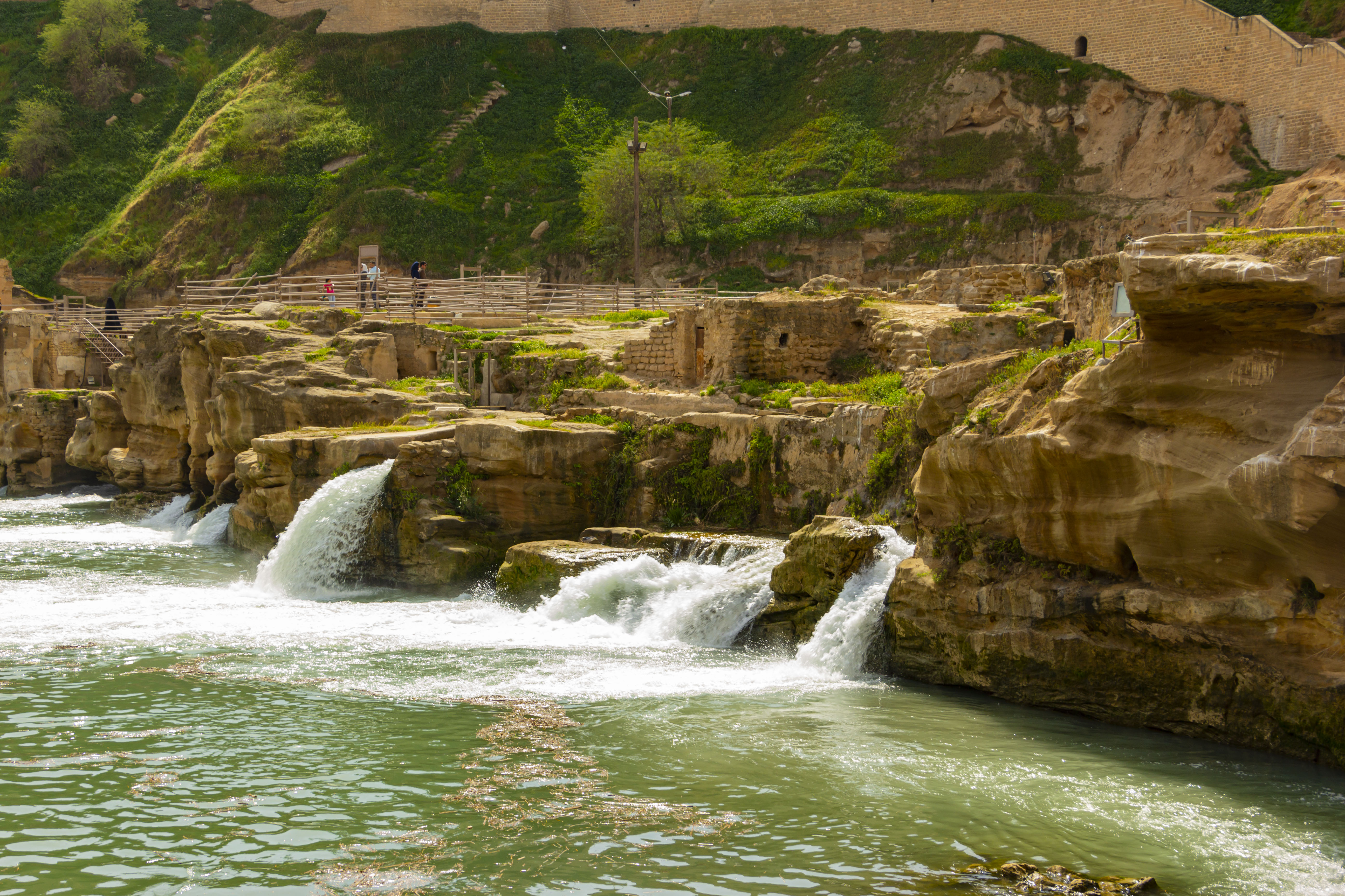 تصویر هوایی پل آزادگان و پل بند شادروان